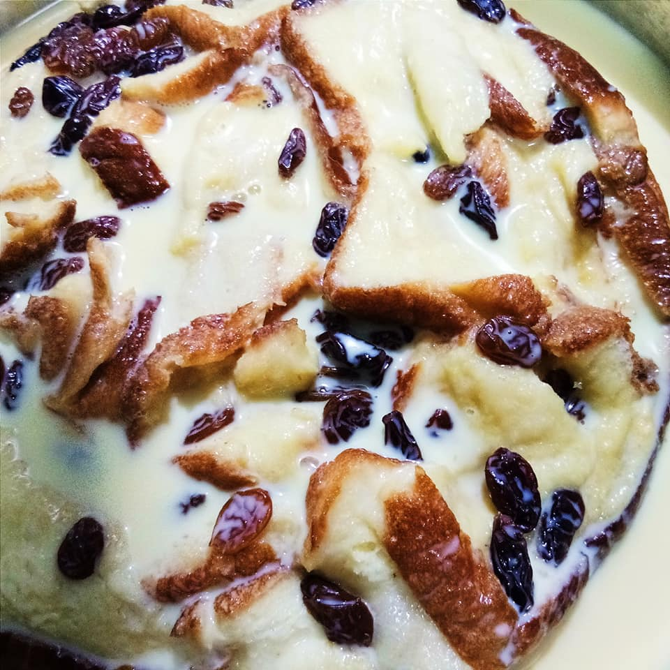 Roti 10-15 keping Kismis 4 cawan susu segar 3 biji telur 5 sudu gula 3 sudu mentega 1 tin susu cair 5~6 sudu gula. 1 gelas air 3 sudu tepung kastad. Mangkuk aluminium foil 1. Gunting kesemua roti menjadi segiempat kecil. Kalau boleh janganlah koyak roti camtu. Takut putus selera bila puding roti dah siap nanti. Nampak tak cantik. 2. Bahan B dicampurkan kesemua sekali dalam periuk sederhana, masak guna api kecil sahaja. 3. Apabila dah sebati, taburkan kismis diatas roti (dalam aluminium foil) dan curahkan kuah yang dah masak tadi. 4. Setkan 200Celcius selama 45 minit pada oven anda. 5. Untuk membuat sos, camppurkan semua bahan kedalam periuk, masak menggunakan api kecil sehingga likat. Setelah likat padamkan api tersebut. Dah siap